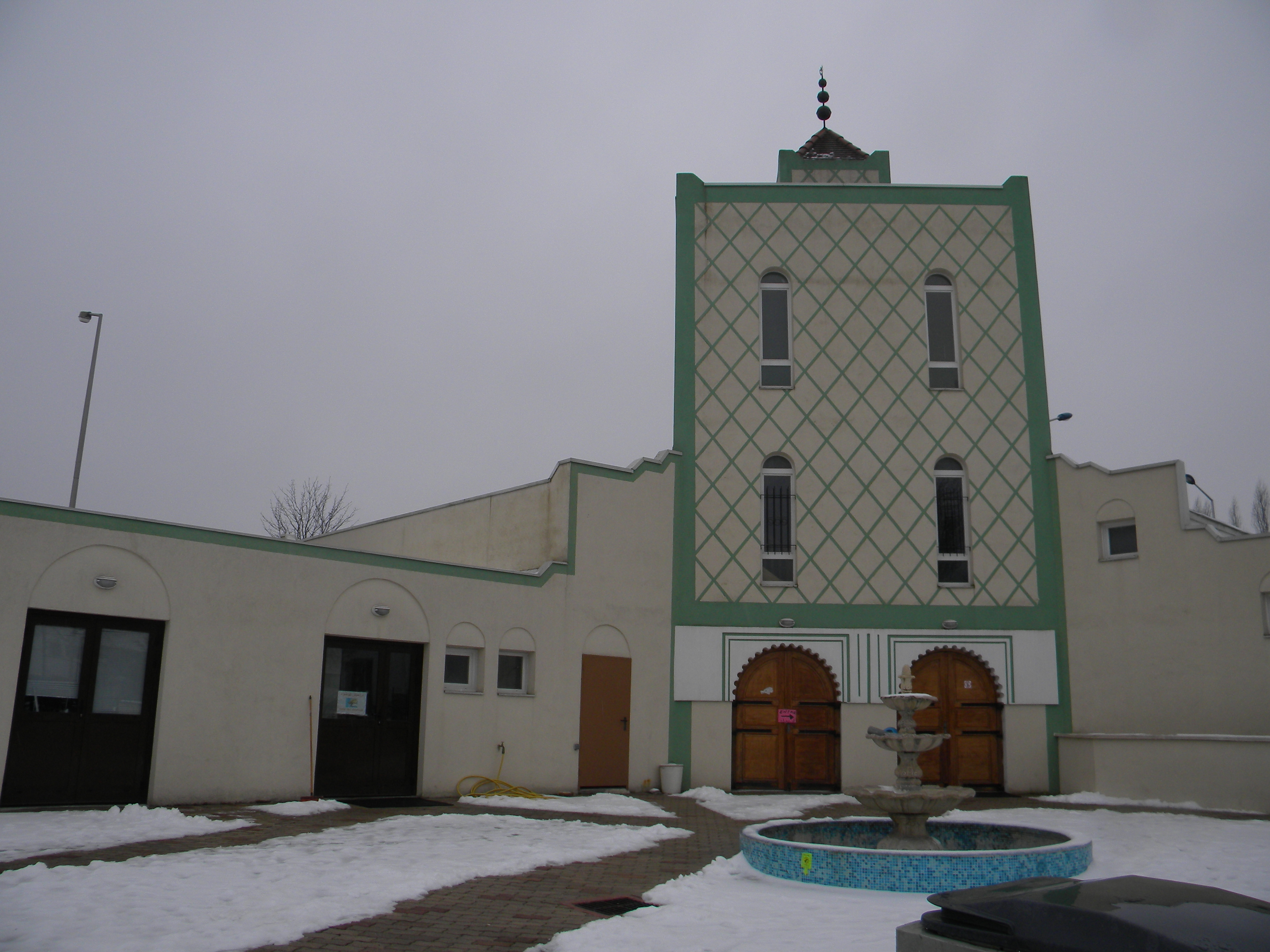 Mosquée Assalam